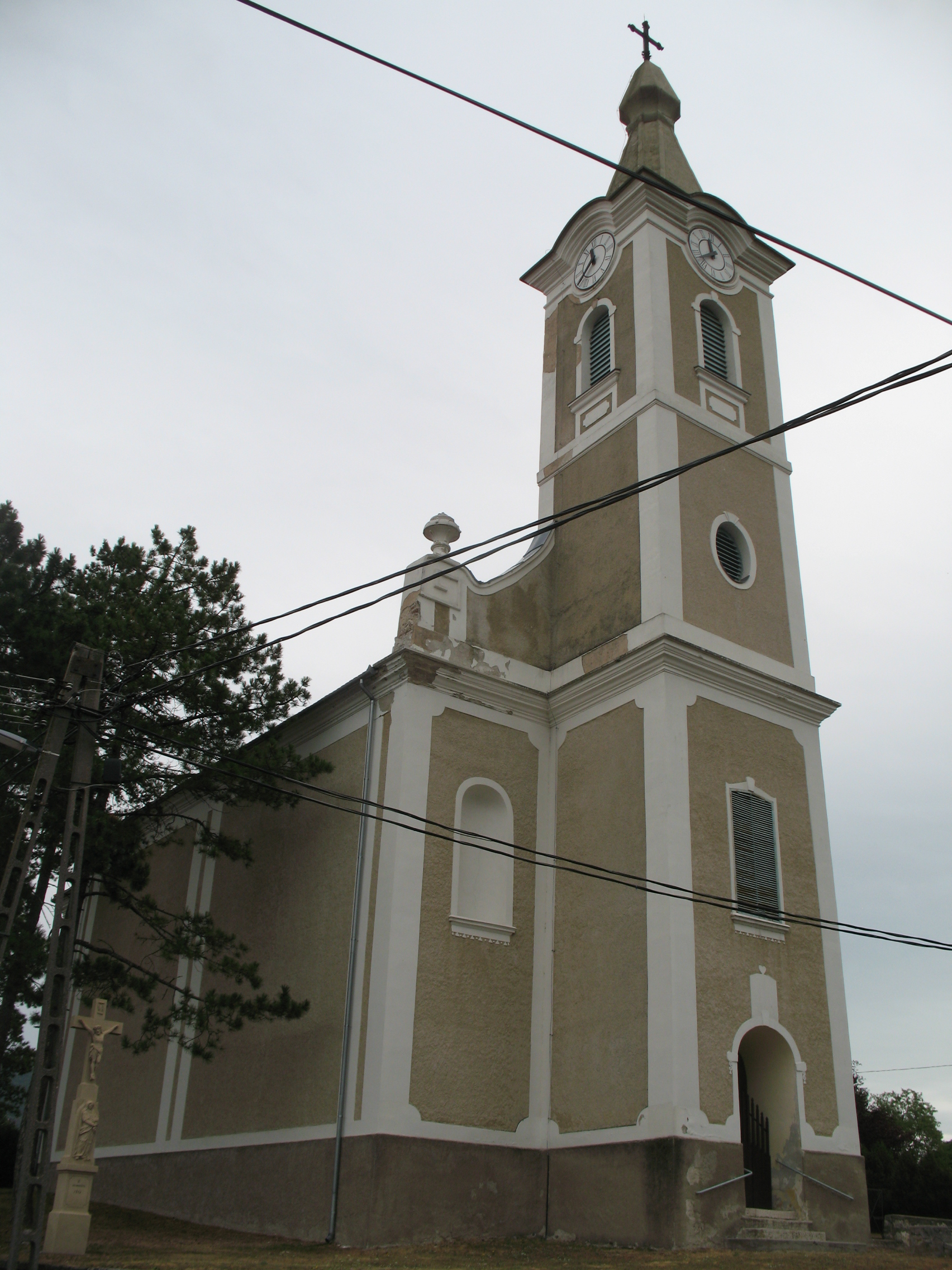 Gyulakeszi